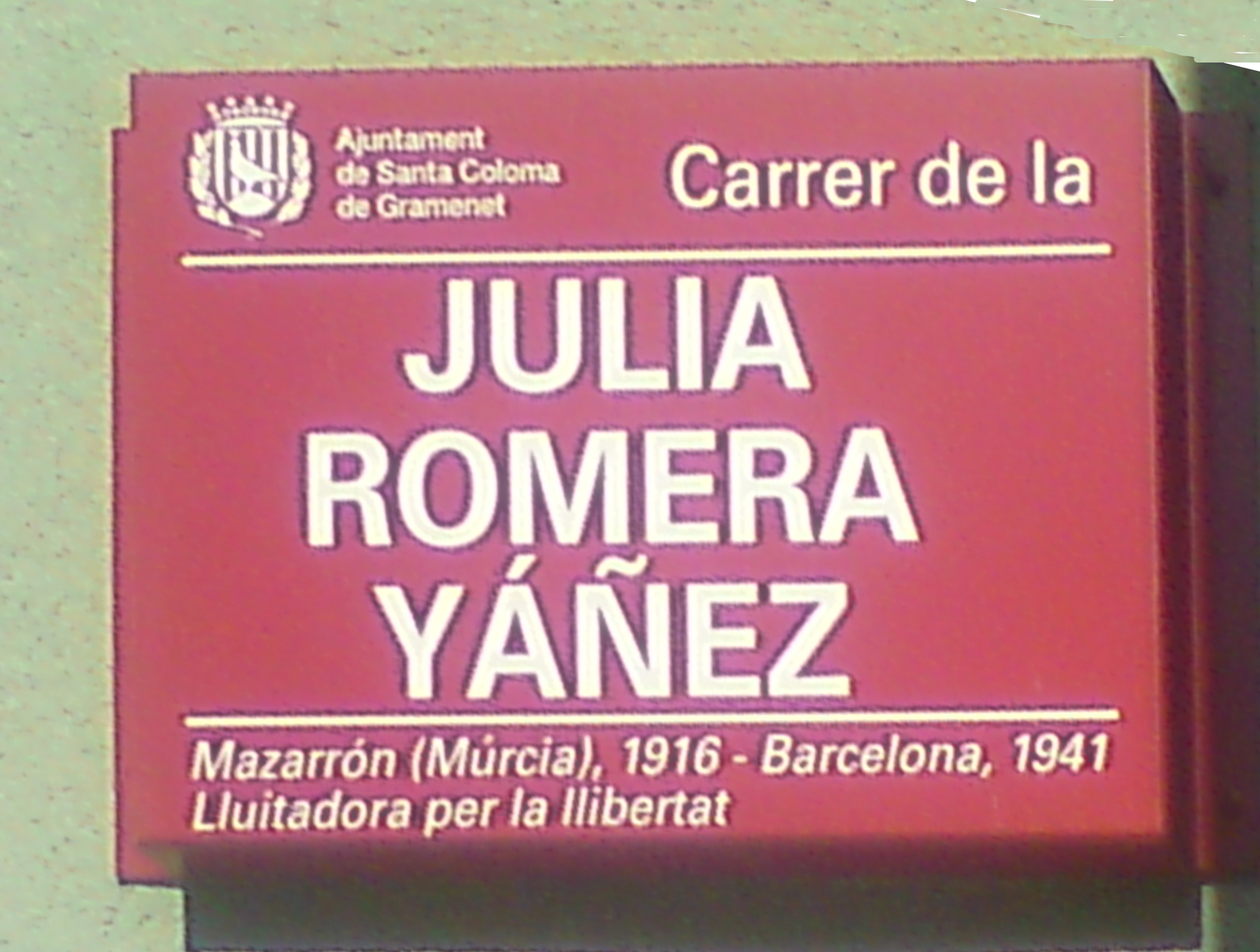 Calle de Julia Romera Yáñez